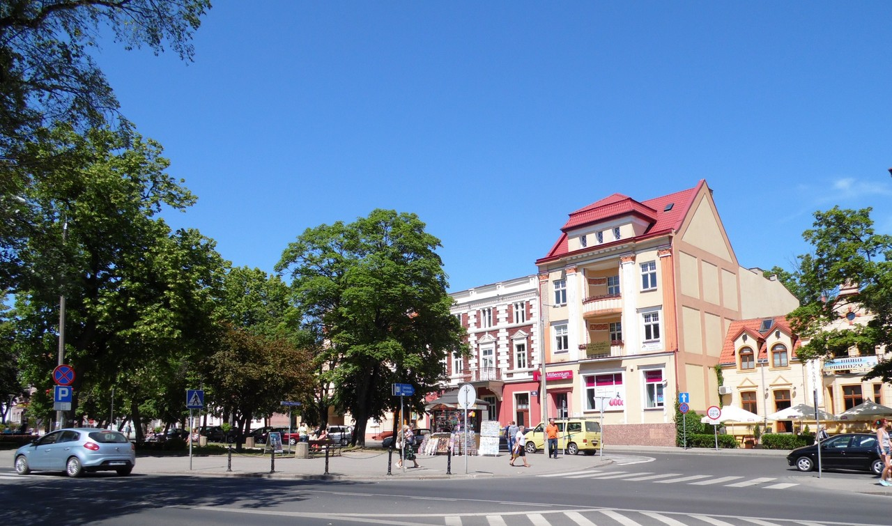 ZABYTKOWA CZĘŚĆ MIASTA.